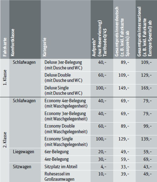 City-Night-Line-Preisdatentabelle-2011